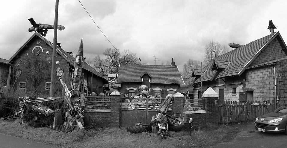 Face de la ferme aux avions telle que l'on pouvait la voir en février 2014